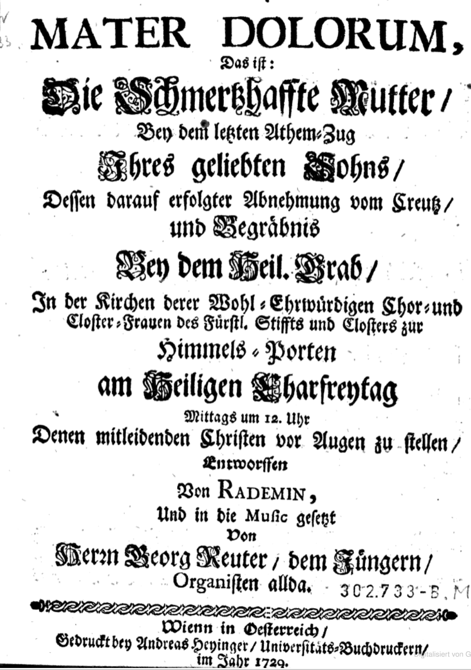 Textblatt Mater Dolorum. Das ist: Die Schmertzhaffte Mutter/ Bey dem letzten Athem=Zug Ihres geliebten Sohns/ ... Entworffen von Rademin, Und in die Music gesetzt Von Georg Reuter, Heyinger, Wien 1729